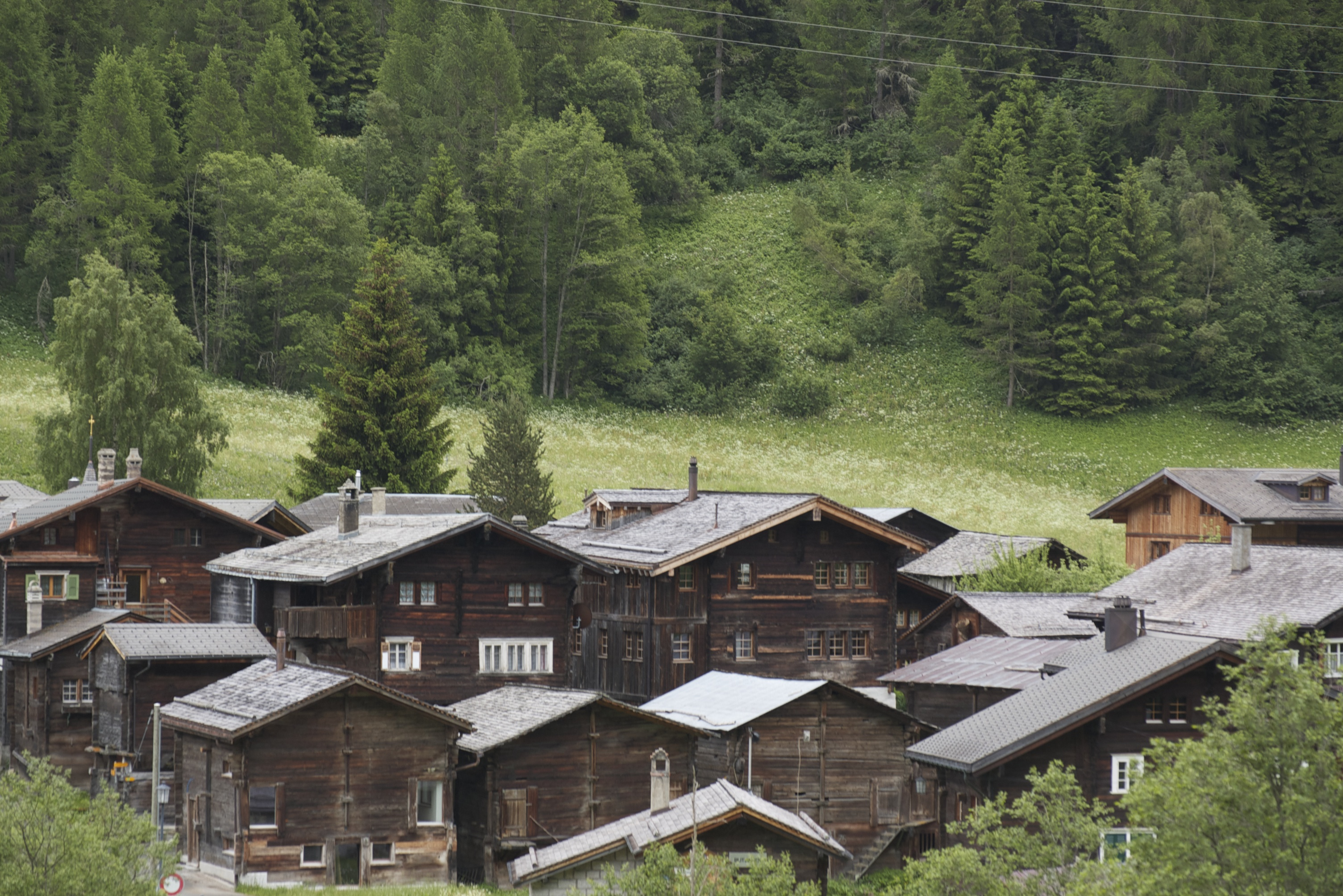 Blick von der Haltſtell Blitzingen über Bodmen in Gombs.